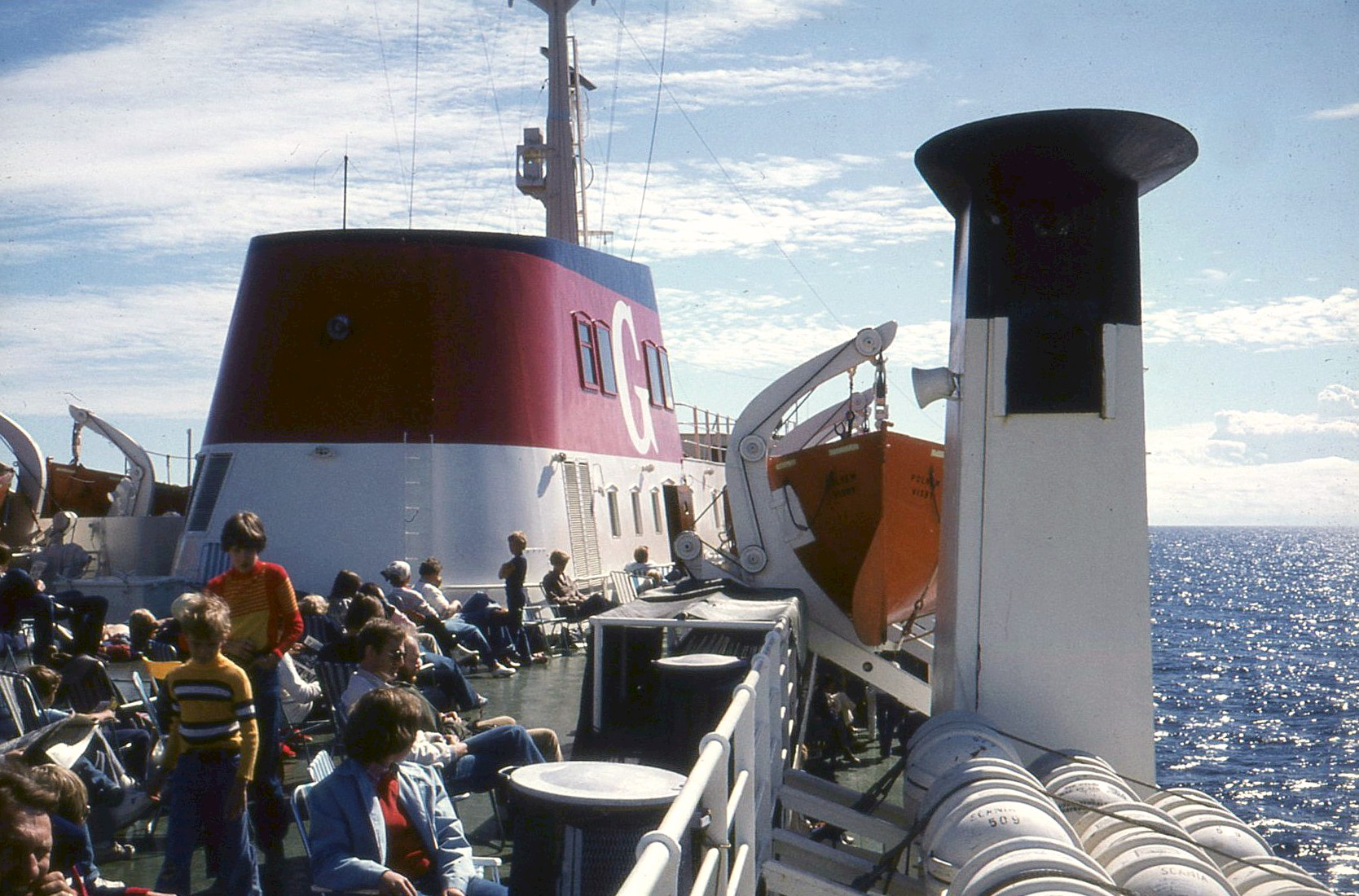 M/S Polhem (tidigare M/S Scania)